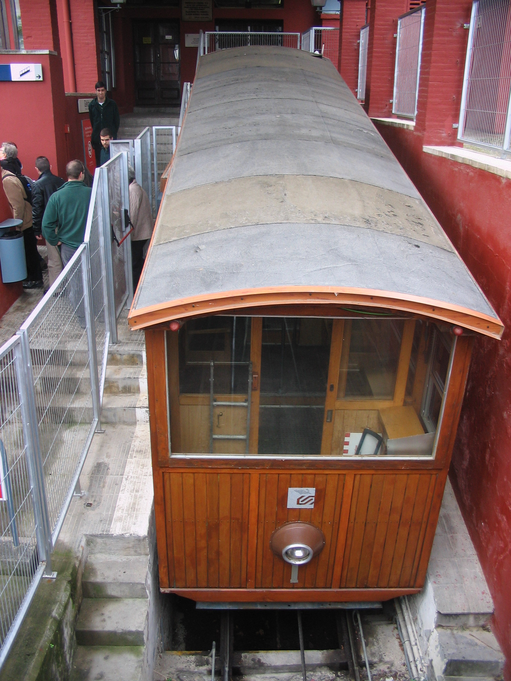 Cabina 1 del funicular en la estación superior, Gelida pueblo.